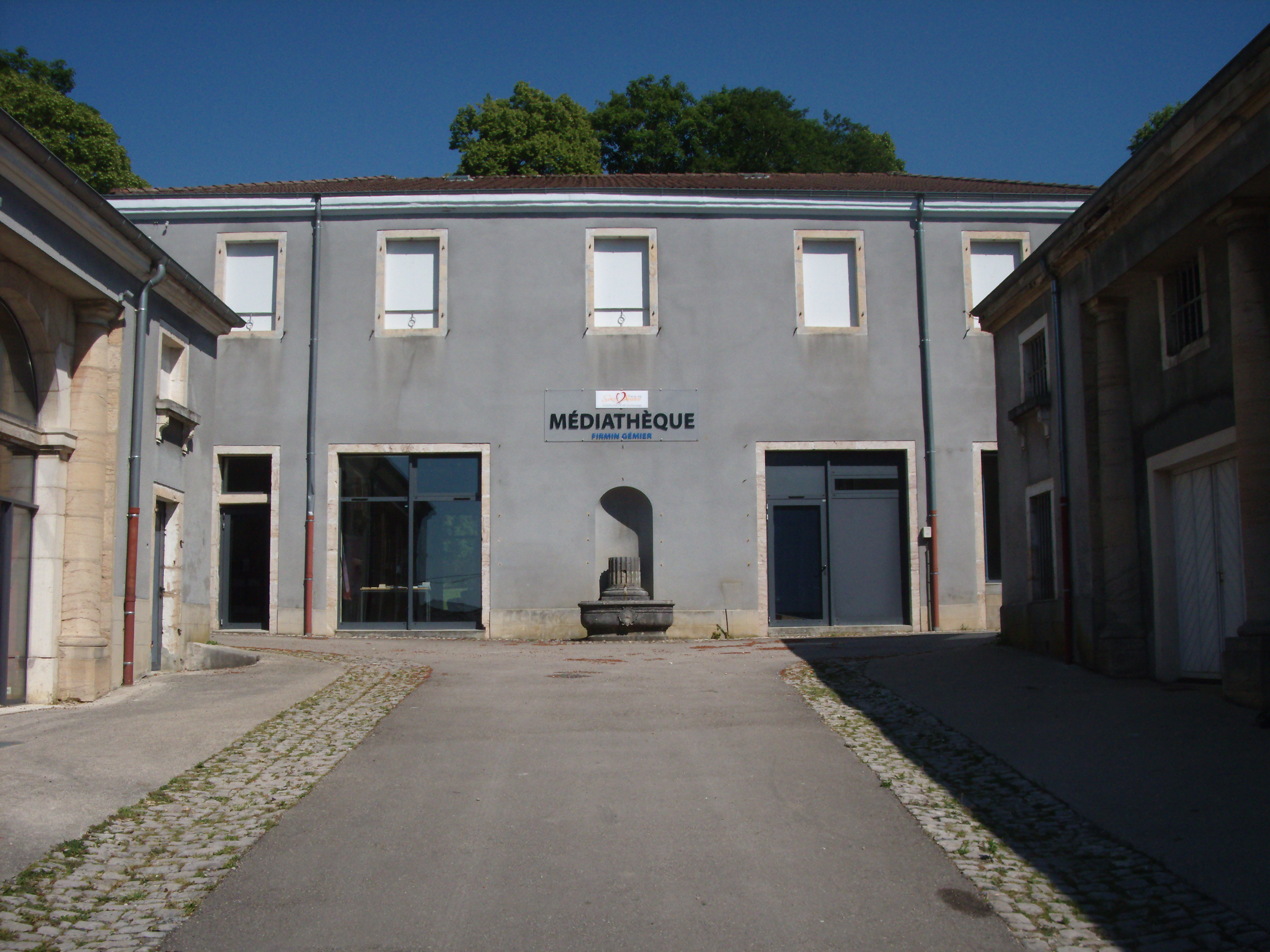 Médiathèque de Saint-Amour dans un bâtiment historique de la ville.